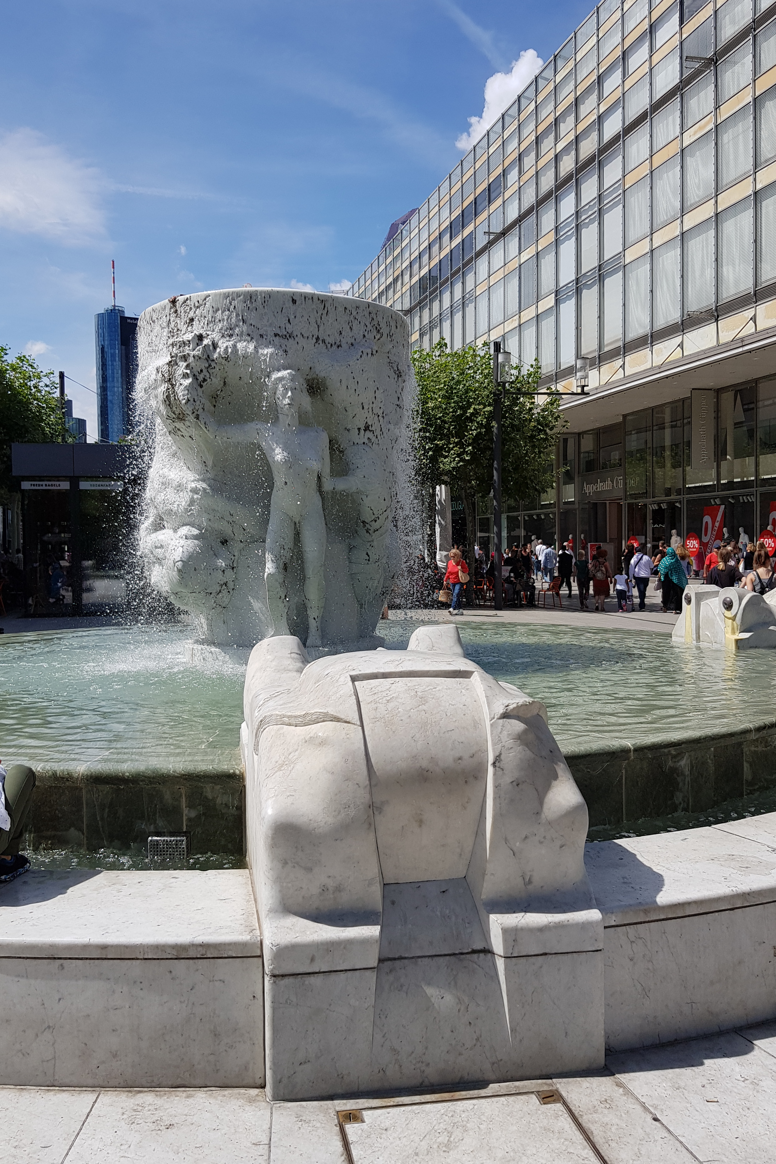 Frankfurter-Figuren-Brunnen, auch Brockhausbrunnen genannt, zwischen Stiftstraße und Hasengasse auf der Zeil in Frankfurt. Errichtet 1984. Künstler: Bildhauer Lutz Brockhaus. Der Brunnen wurde aus einem 38 Tonnen schweren weißen Marmorblock aus Carrara (Italien) vor Ort gemeißelt.